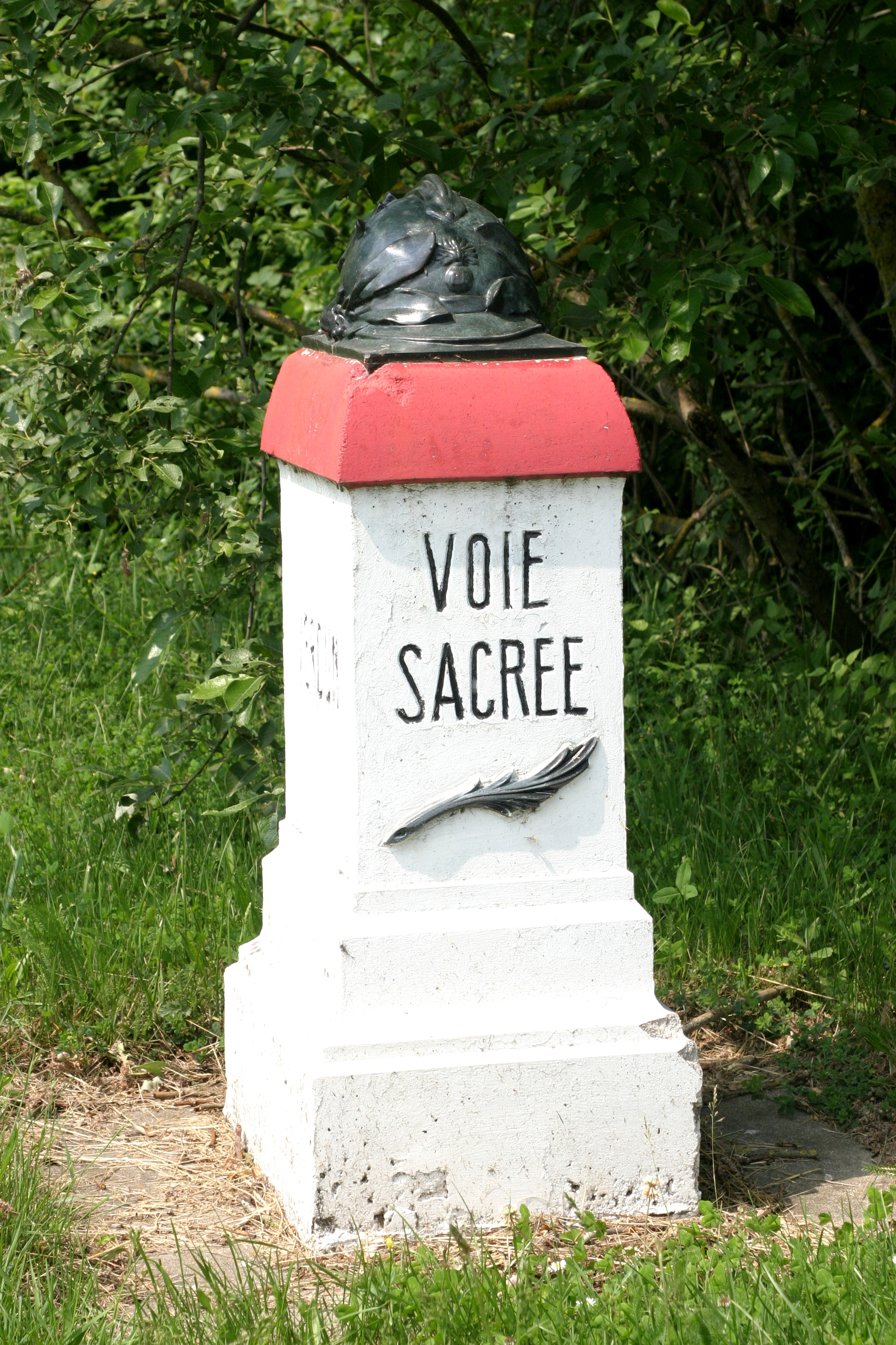 E Kilometersteen op der Voie Sacrée